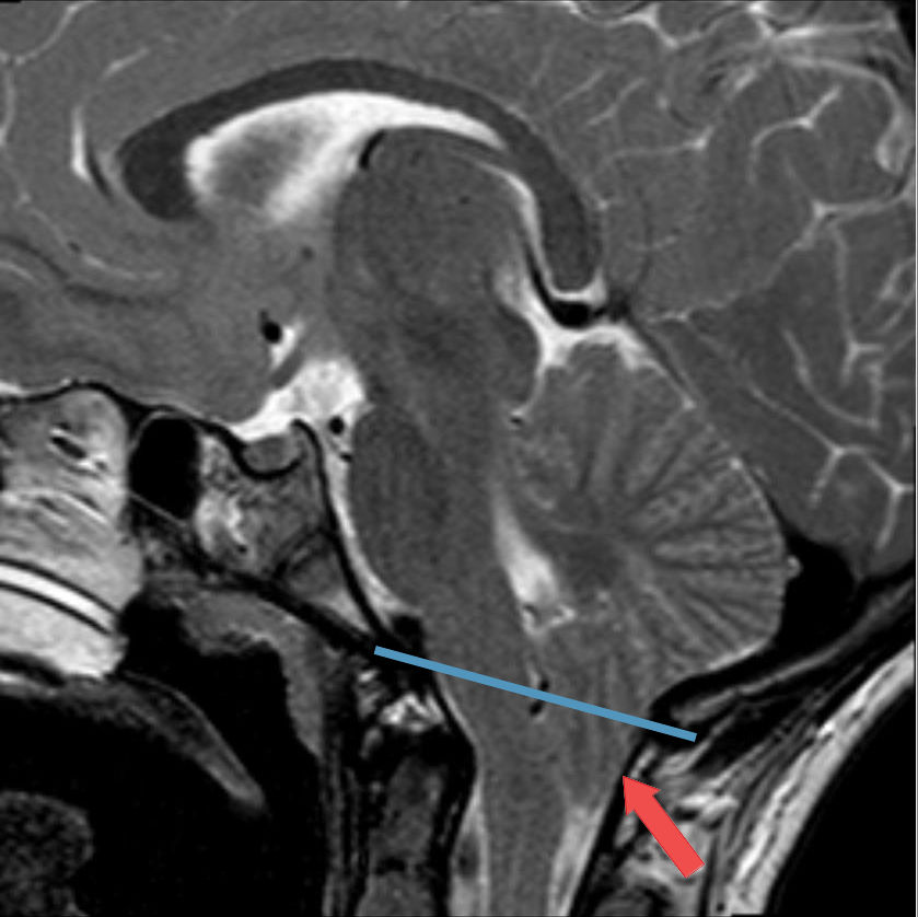 Chiari-1 Malformation bei einer 13-jährigen in der Magnetresonanztomographie: T2 sagittal. Der Pfeil zeigt auf die deutlich hernierenden Kleinhirntonsillen. Die blaue Linie markiert die Ebene des Foramen magnums.